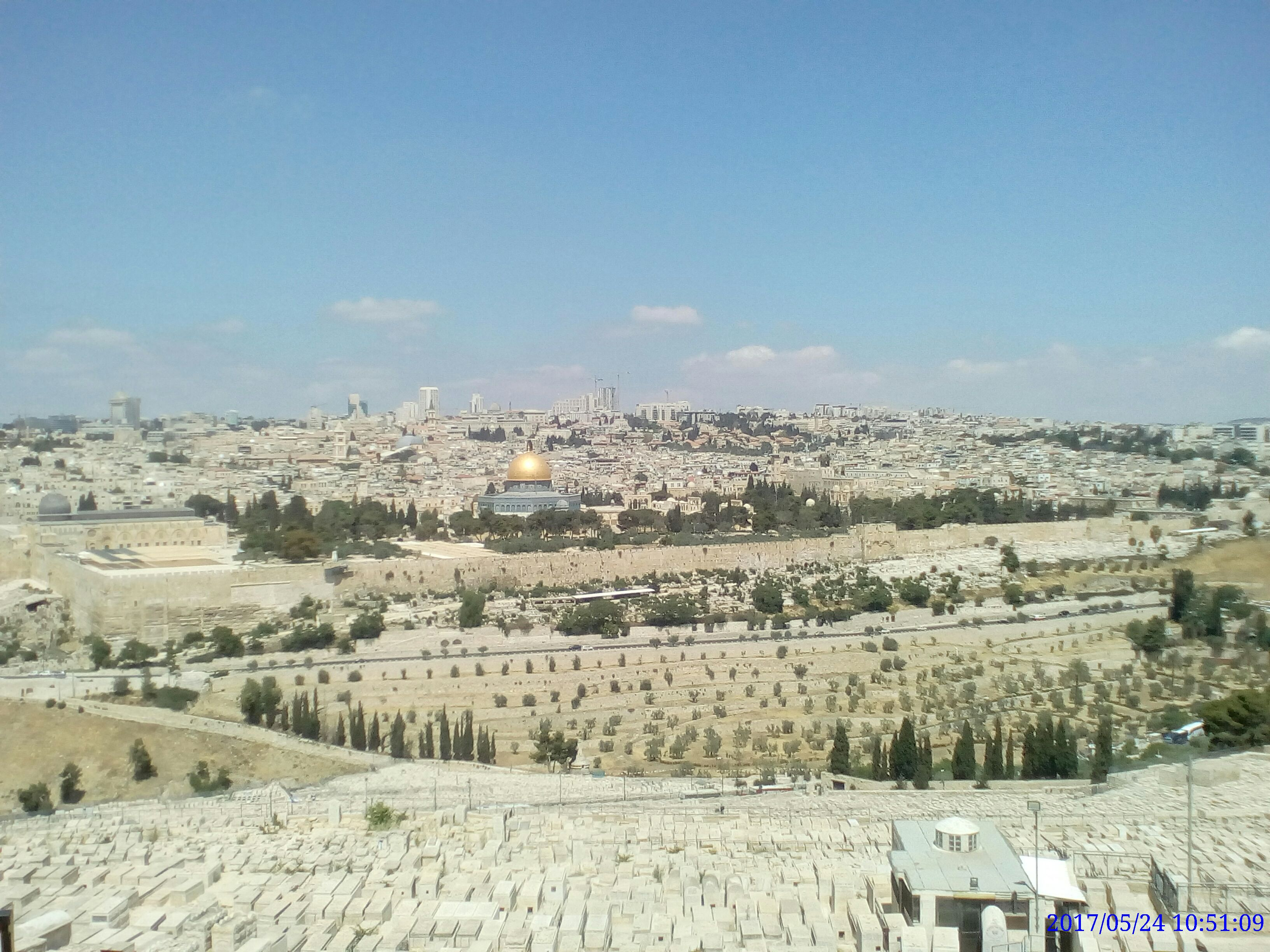 מבט מהר הזיתים אל הכותל המזרחי של הר הבית. במרכז התמונה נראית כיפת הסלע שעל פי המסורת המקובלת תחתיה עמדה אבן השתיה.